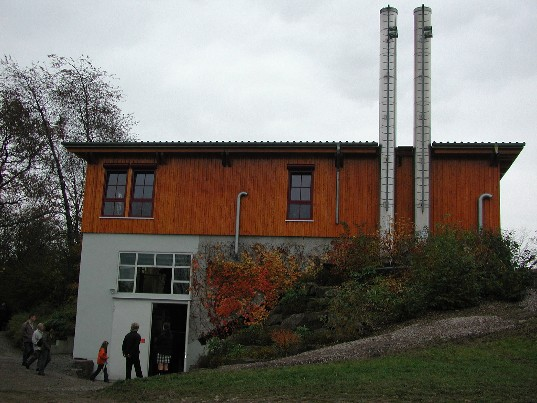 Heizkraftwerk Lieberhausen